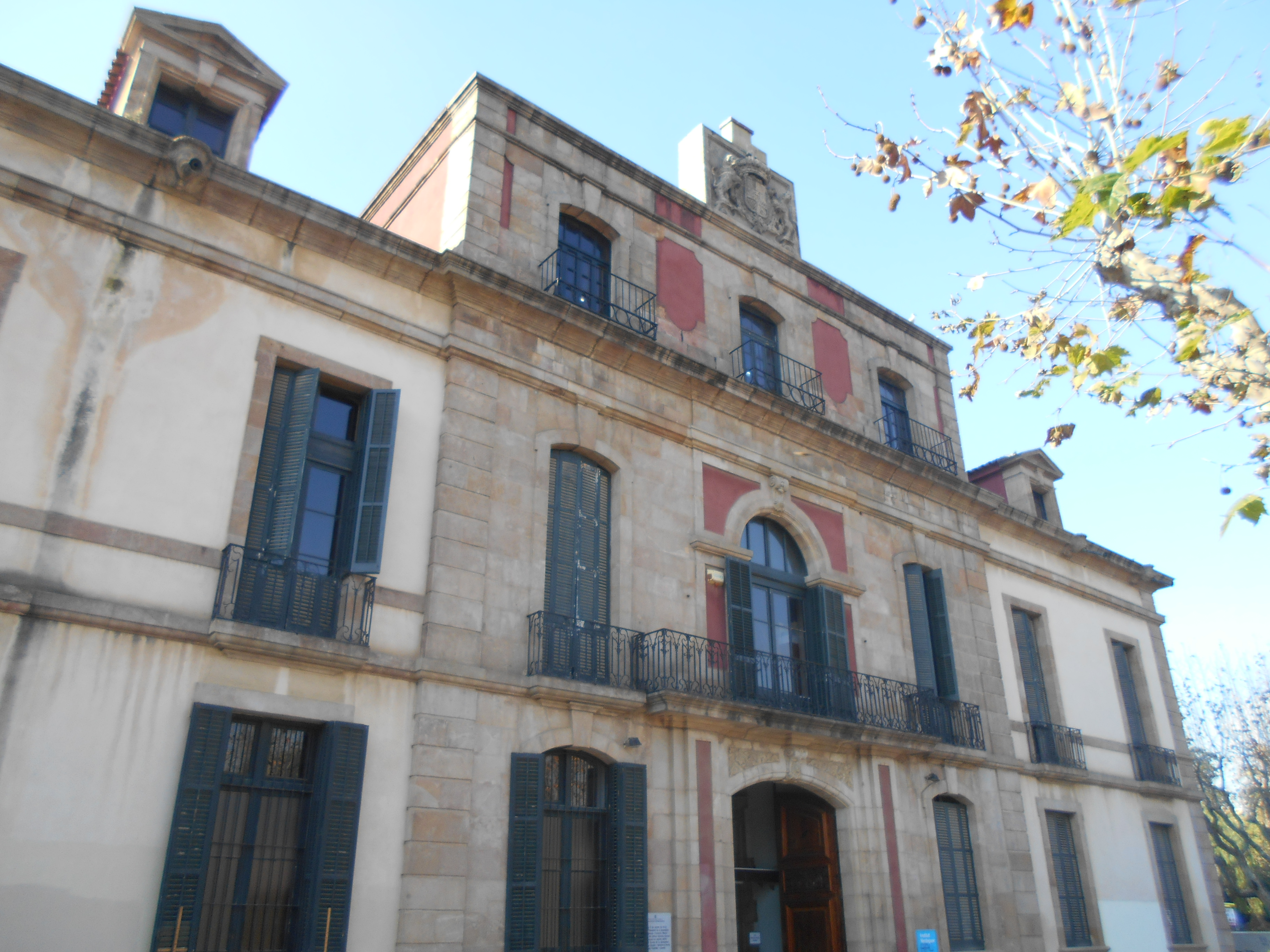 Palacio del Gobernador (Parque de la Ciudadela).